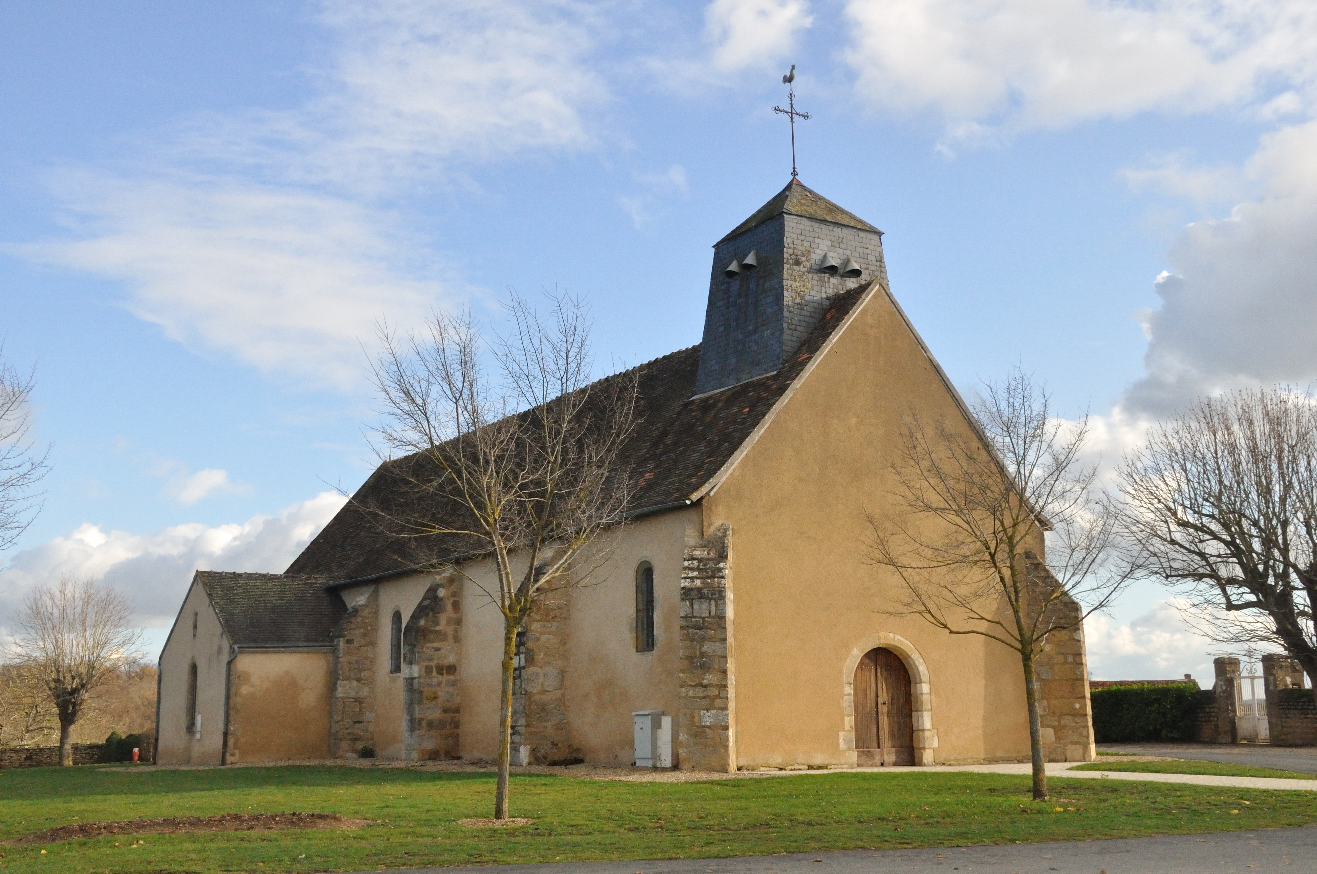 Eglise Saint-Pierre - Sarzay (Indre)